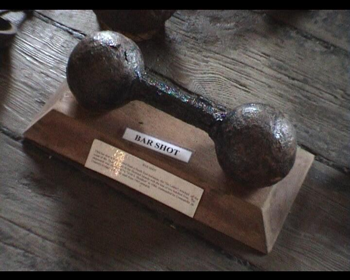 Das Bild zeigt ein sog. Barrengeschoss, das in Kanonen zur Enttakelung von Segelschiffen eingesetzt wurde.